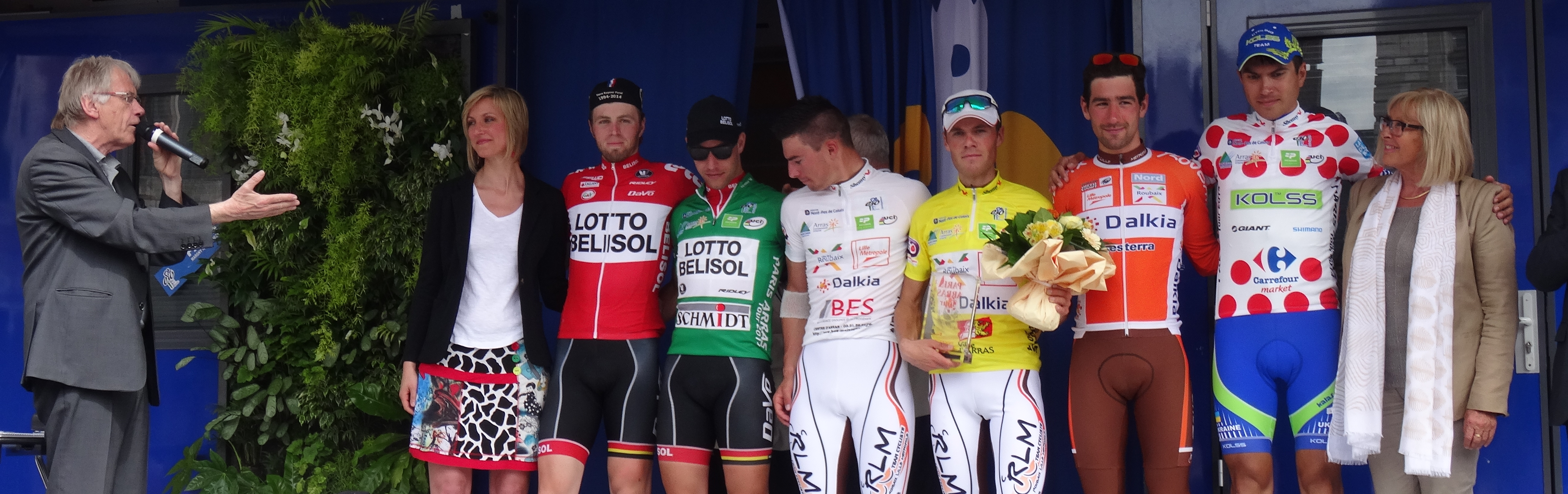 Reportage photographique réalisé le dimanche 25 mai 2014 à l'occasion du départ et de l'arrivée de la troisième étape du Paris-Arras Tour 2014 à Arras, Pas-de-Calais, Nord-Pas-de-Calais, France. Depicted people: Daniel Mangeas, Daniel McLay, Jef Van Meirhaeghe, Rudy Barbier, Maxime Vantomme, Julien Duval and Oleksandr Polivoda